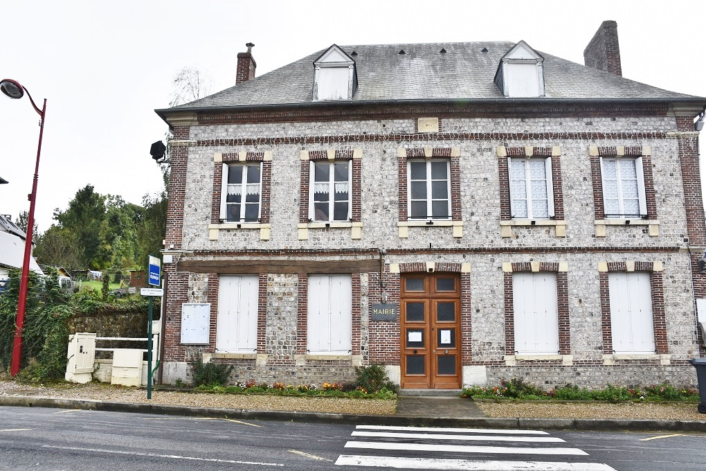 Mairie de Bec-de-Mortagne (76).